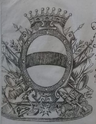 Escudo de D. Santiago de Liniers y Bremod. Investigación Propia. Fotografía que tomé a su real despacho que se encuentra en el Archivo General de la Nación.